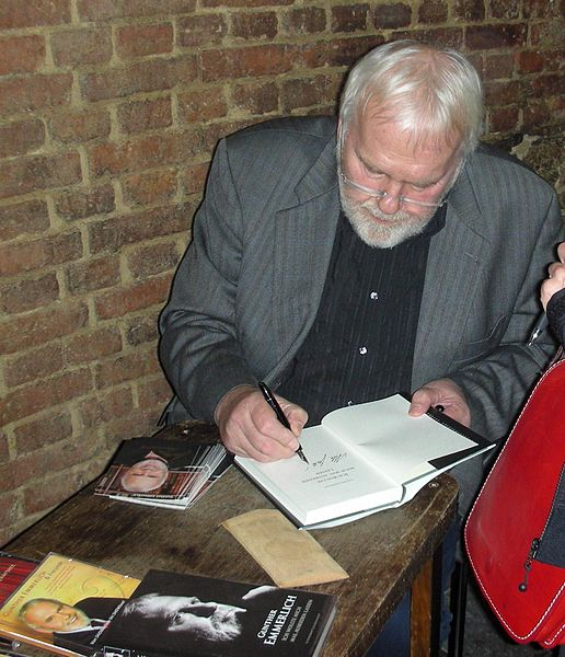 Gunther Emmerlich bei Buchsignierung im Riedelhof in Erlbach (Vogtland